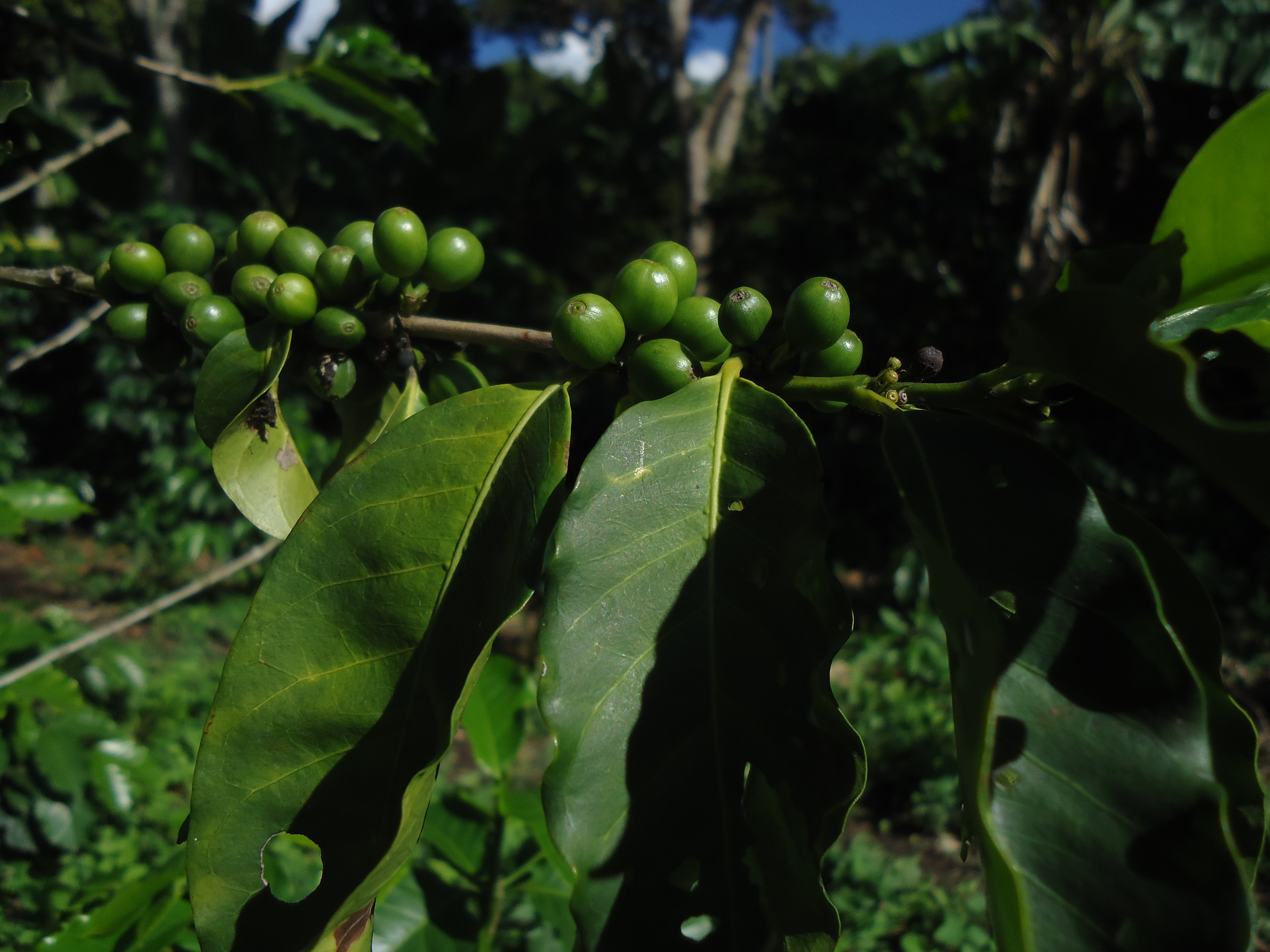 Más del 80% los cultivos en salamina son de café.